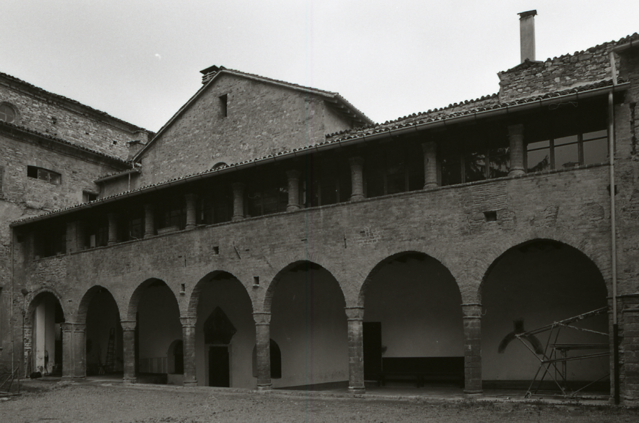 Museo dell'Abbazia di San Colombano: esterni e interni con reperti archeologici. Istituto Beni culturali Bologna.